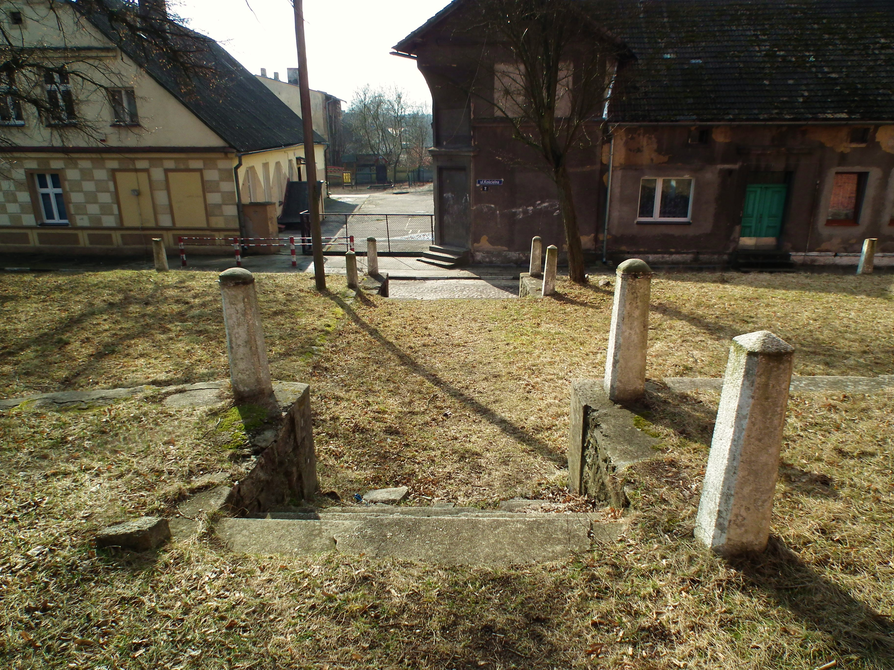 Krajobraz miejski z Lędyczka.